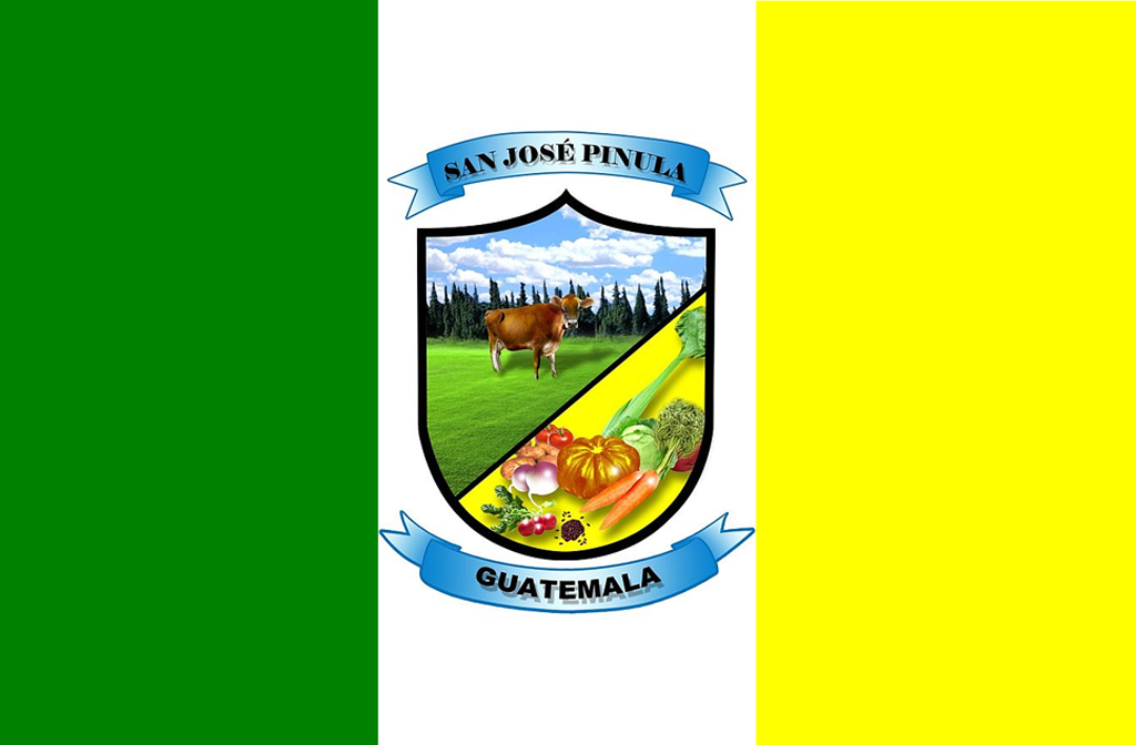 Bandera de San Jose Pinula